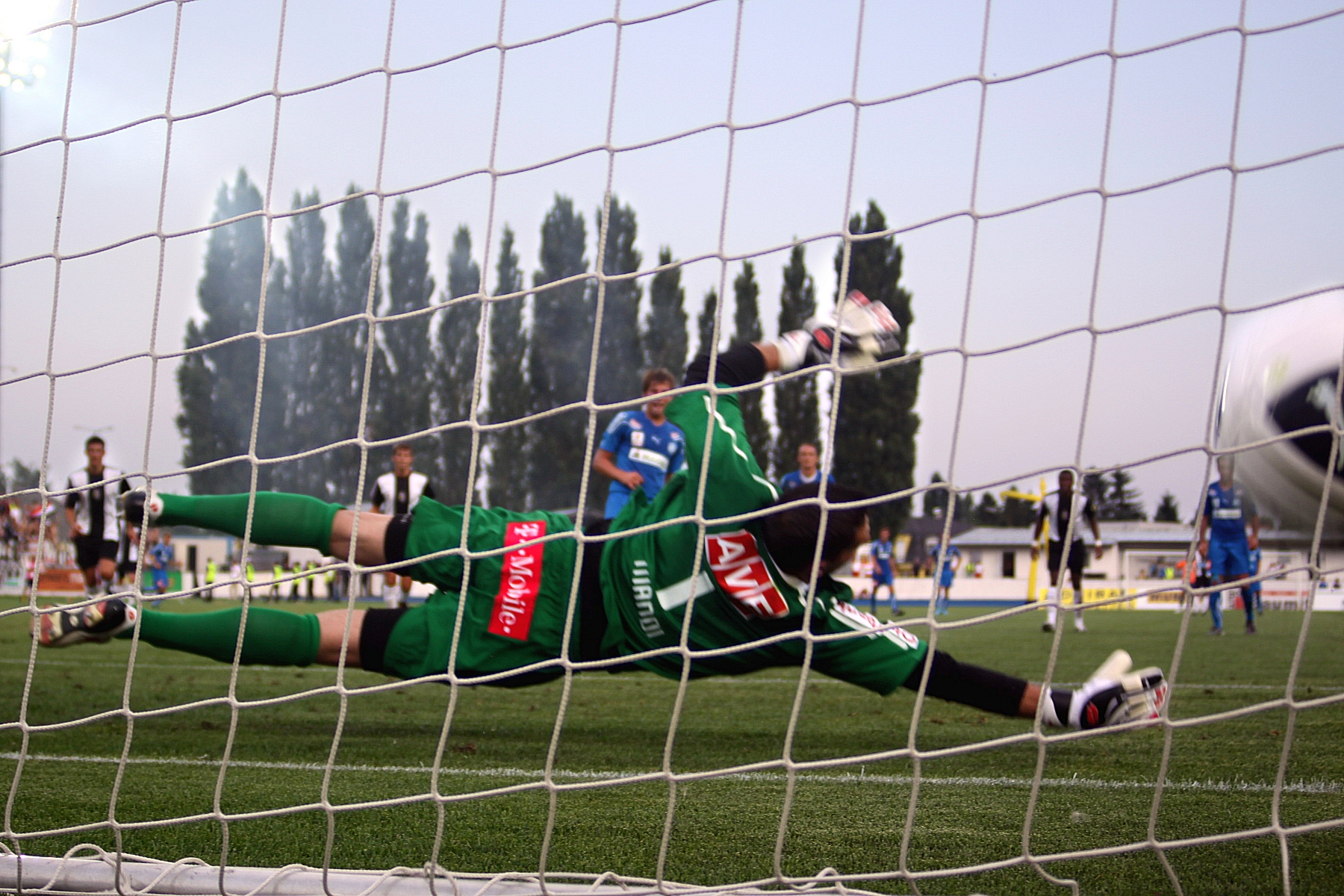 SC Magna Wiener Neustadt gegen LASK Linz 5:0 – Alexander Grünwald verwandelt einen Strafstoß gegen Torhüter Thomas Mandl